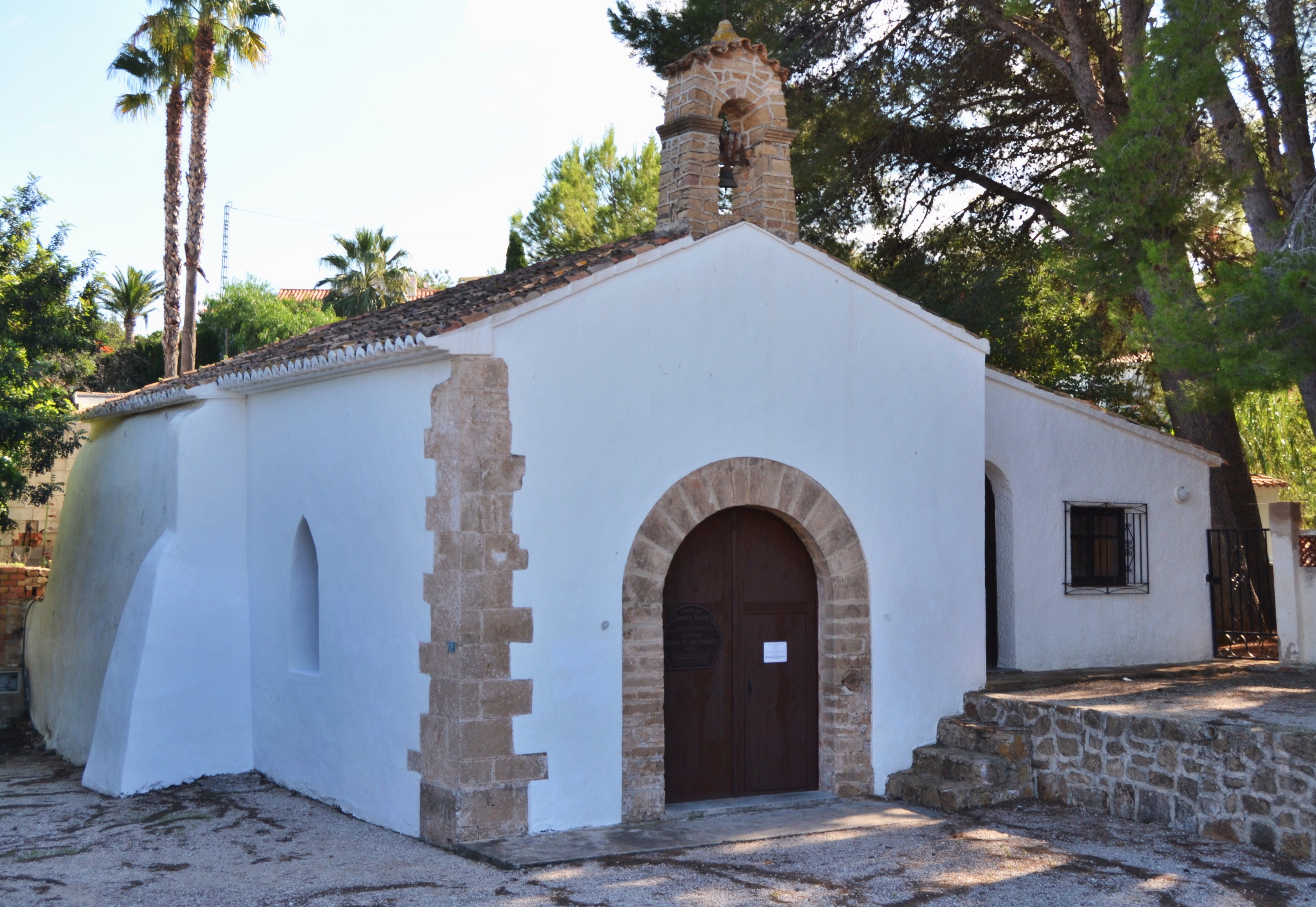 Ermita de santa Llúcia de Dénia.